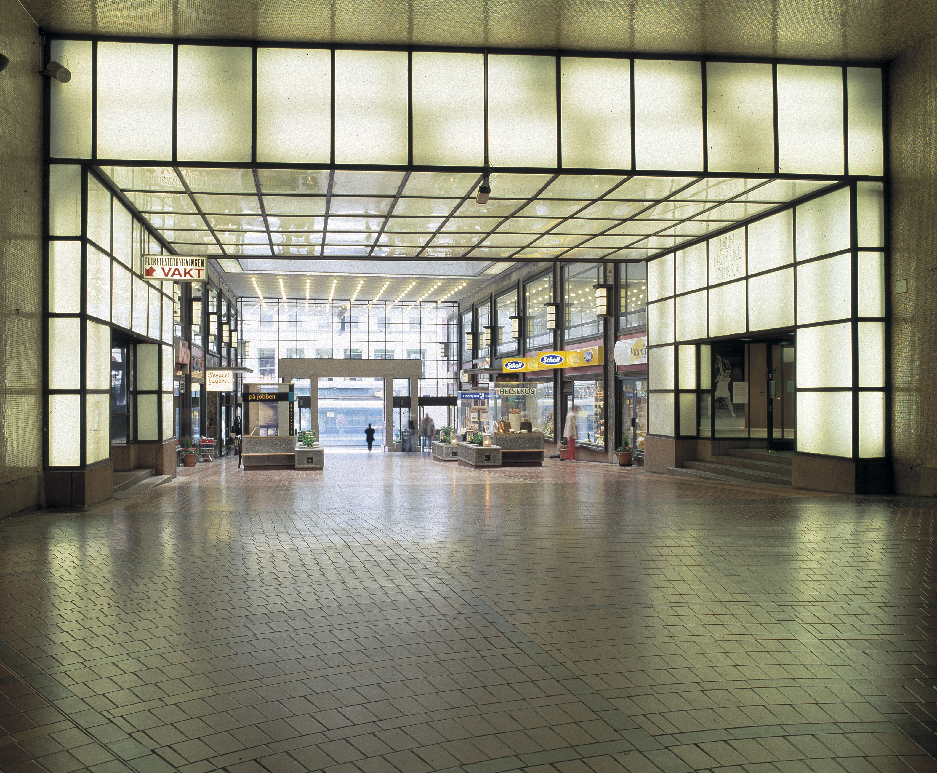 Folketeaterbygningen ble tegnet av Christian Morgenstierne og Arne Eide. Bygningen sto ferdig i 1935 og ble fredet i 2009.